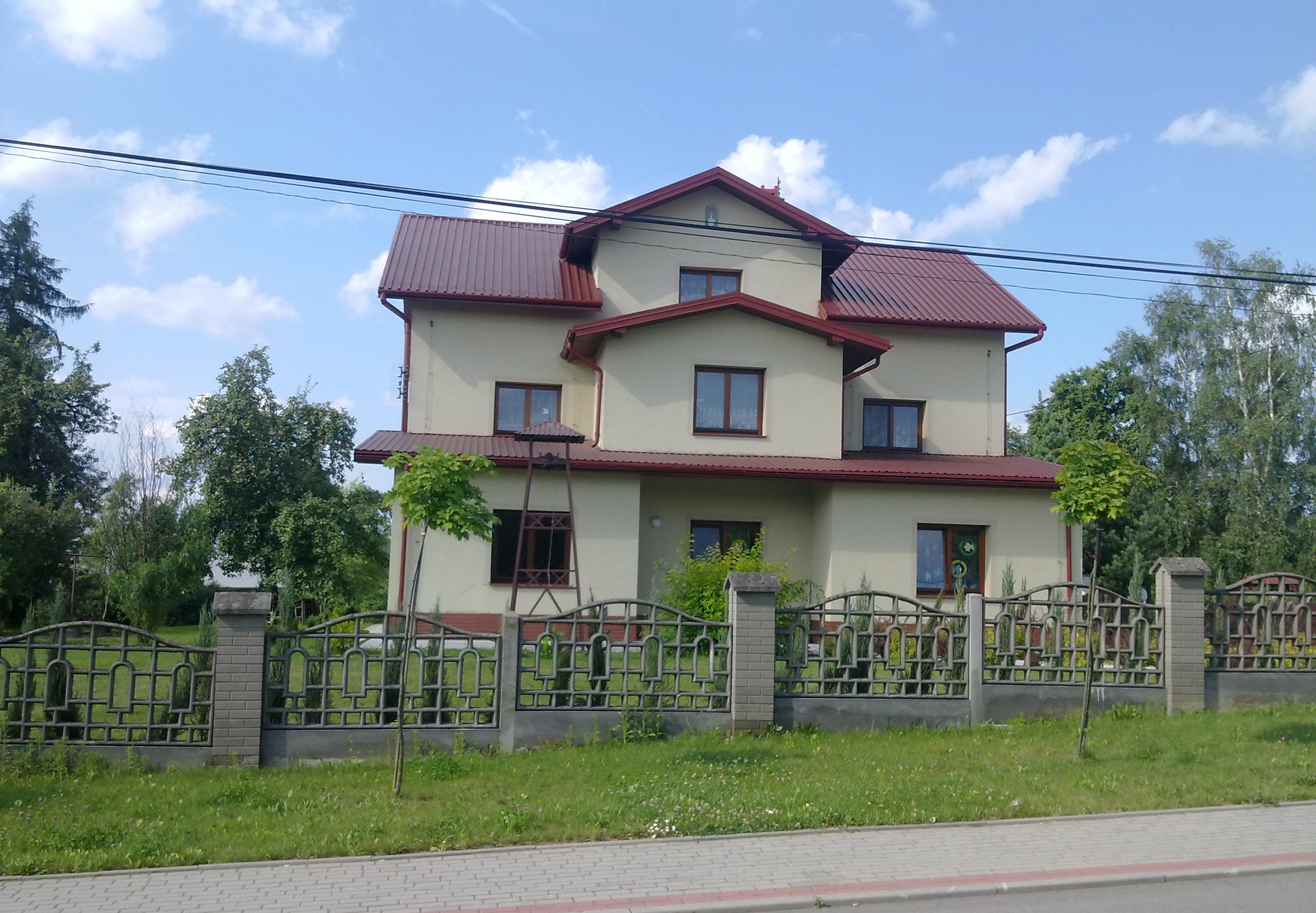 Nowodworze. Ochronka sióstr NMP z kaplicą p.w. św.Józefa. Wybudowana w latach 1991-1993 kilka metrów na południe od poprzedniej, rozebranej. Fot.2013 autor Łukasz Nowakowski